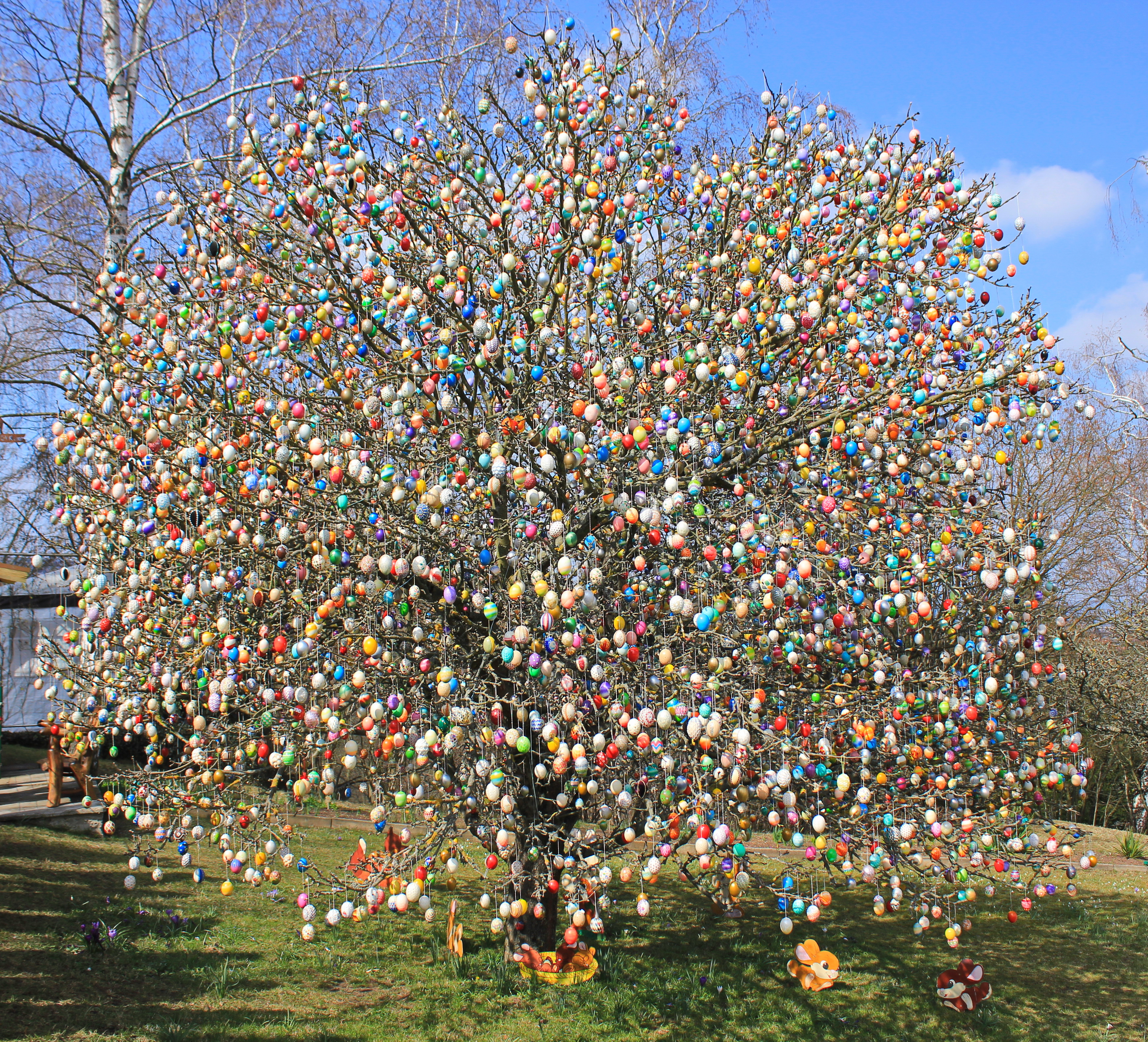 Der Ostereierbaum der Familie Kraft in Saalfeld: wurde geschmückt von 1965 - 2015.